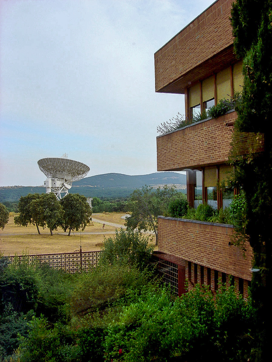 El Centro de Comunicaciones por Satélite de Buitrago es uno de los edificios principales de la empresa Telefónica en España. Fue inaugurado en 1967 y es obra del famoso arquitecto Julio Cano Lasso.